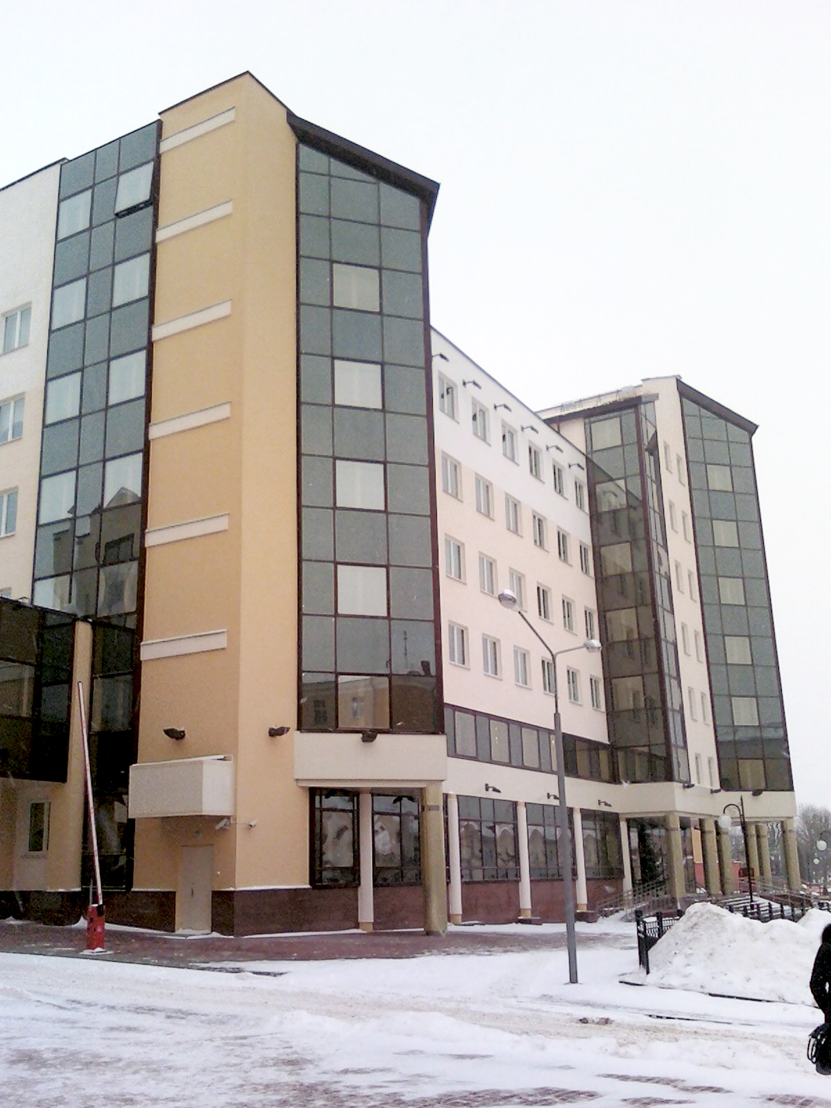 Морфологический корпус витебского государственного медицинского университета.